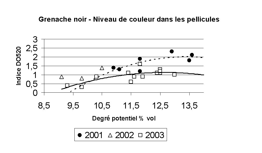 Mesures de potentiel couleur dans des baies raisins cépage Grenache selon les millésimes et niveau de maturité